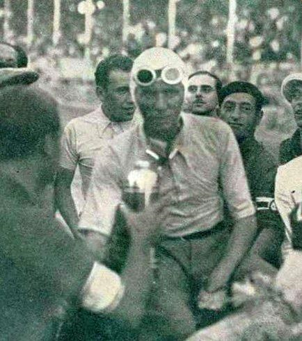 Achille Varzi, vainqueur du Grand Prix de Nice 1934.